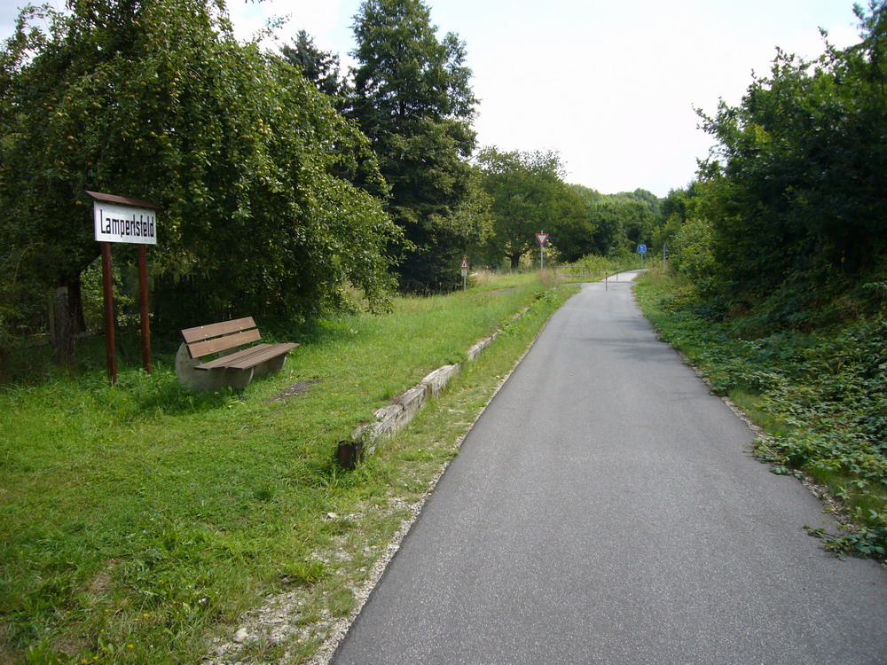 Foto des ehemaligen Haltepunktes Lampertsfeld, aufgenommen von Dr. Karl Schlemmer am 10.8.2006